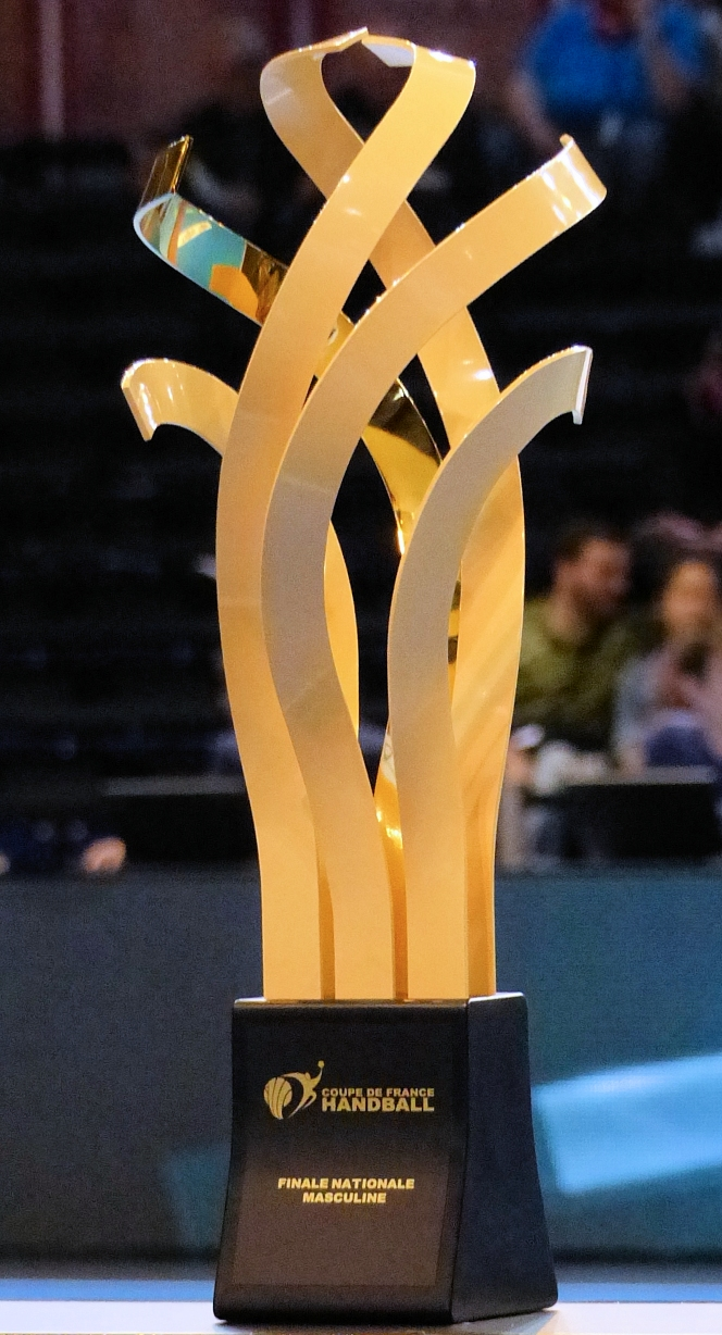 Coupe de France Nationale Masculine 2014. Le 25 mai 2014 à la Halle Carpentier (Paris 13e). Elle sera remise au PSG Handball qui bat Chambéry Savoie Handball.